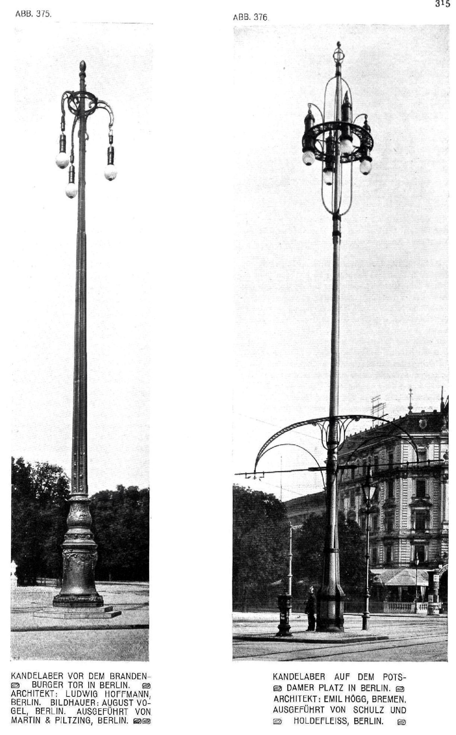 Bogenlampen-Kandelaber von Hoffmann und Högg, Abbildungen von 1905. Aus: Berliner Architekturwelt, 8. Jahrgang 1905/1906 Heft 8, Oktober 1905, S. 315. Links der von Ludwig Hoffmann entworfene dreiflammige Bogenlampen-Kandelaber, der 1995 auf dem Platz vor dem Brandenburger Tor aufgestellt wurde. Rechts der von Emil Högg entworfene vierflammige Bogenlampen-Kandelaber, der ebenfalls 1905 auf dem Potsdamer Platz errichtet wurde